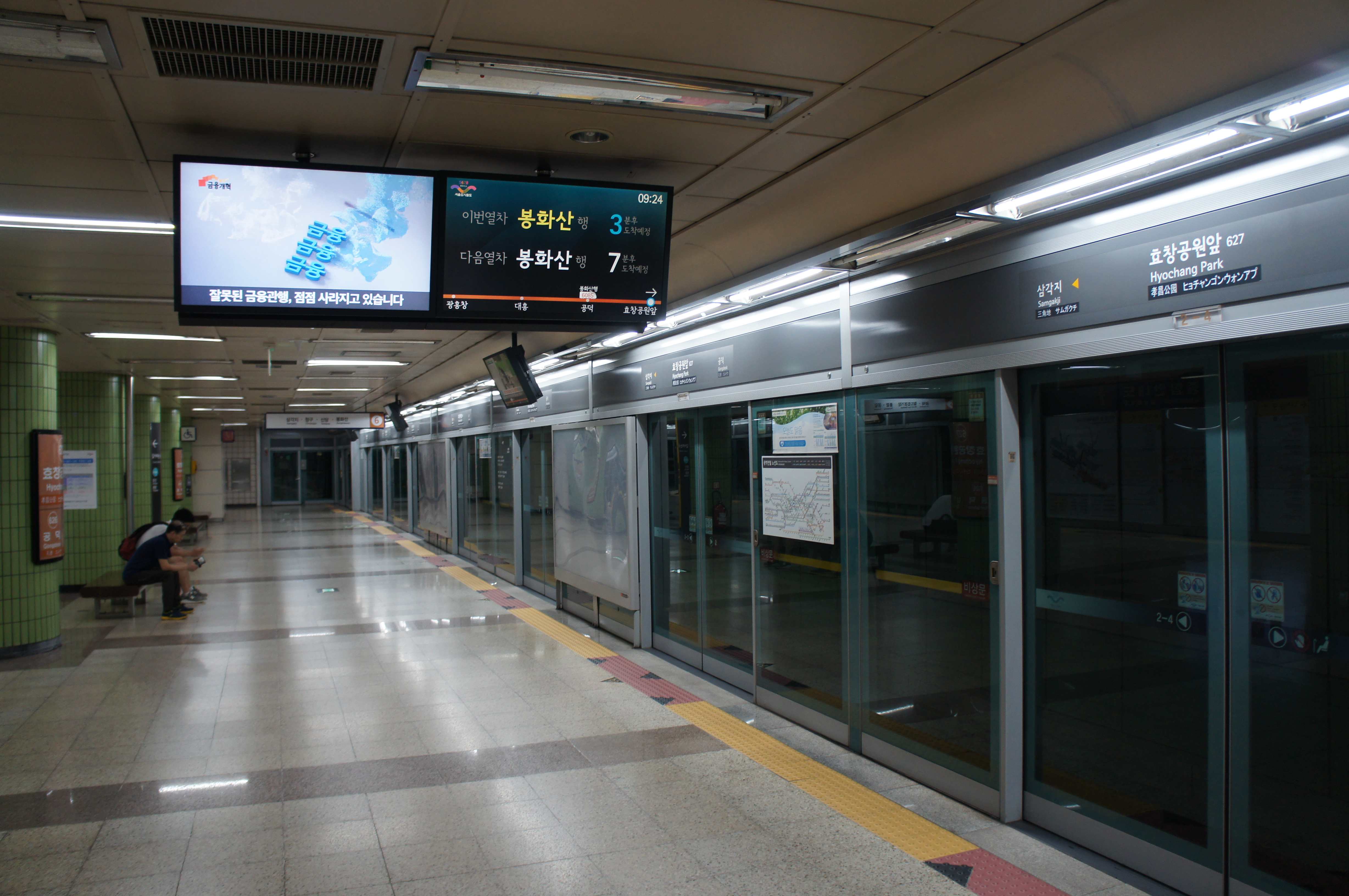 6호선 효창공원앞역 승강장